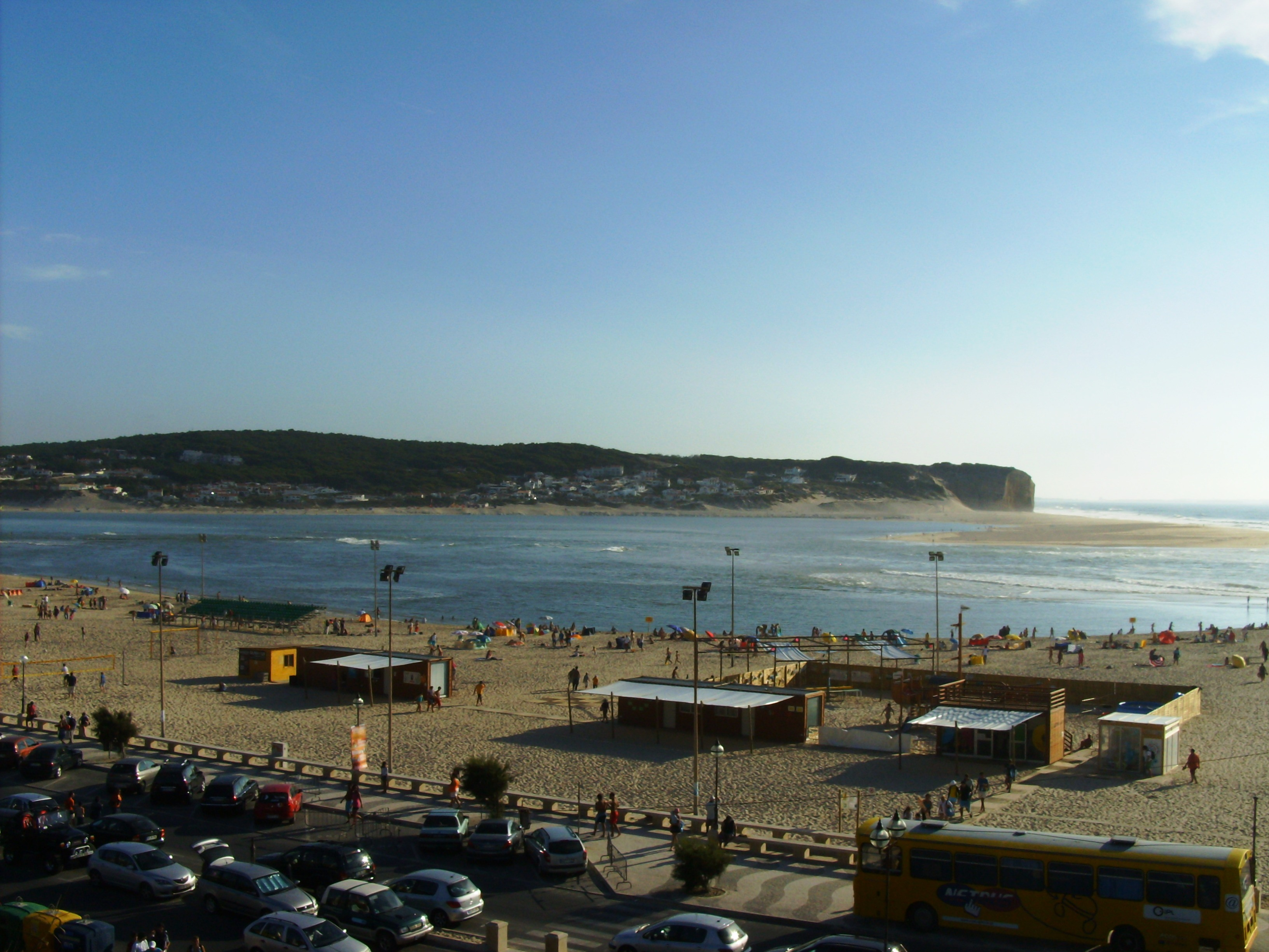 Foz do Arelho, Portugal: concelho de Caldas da Rainha, distrito de Leiria, vista da praia (Verão 2008).